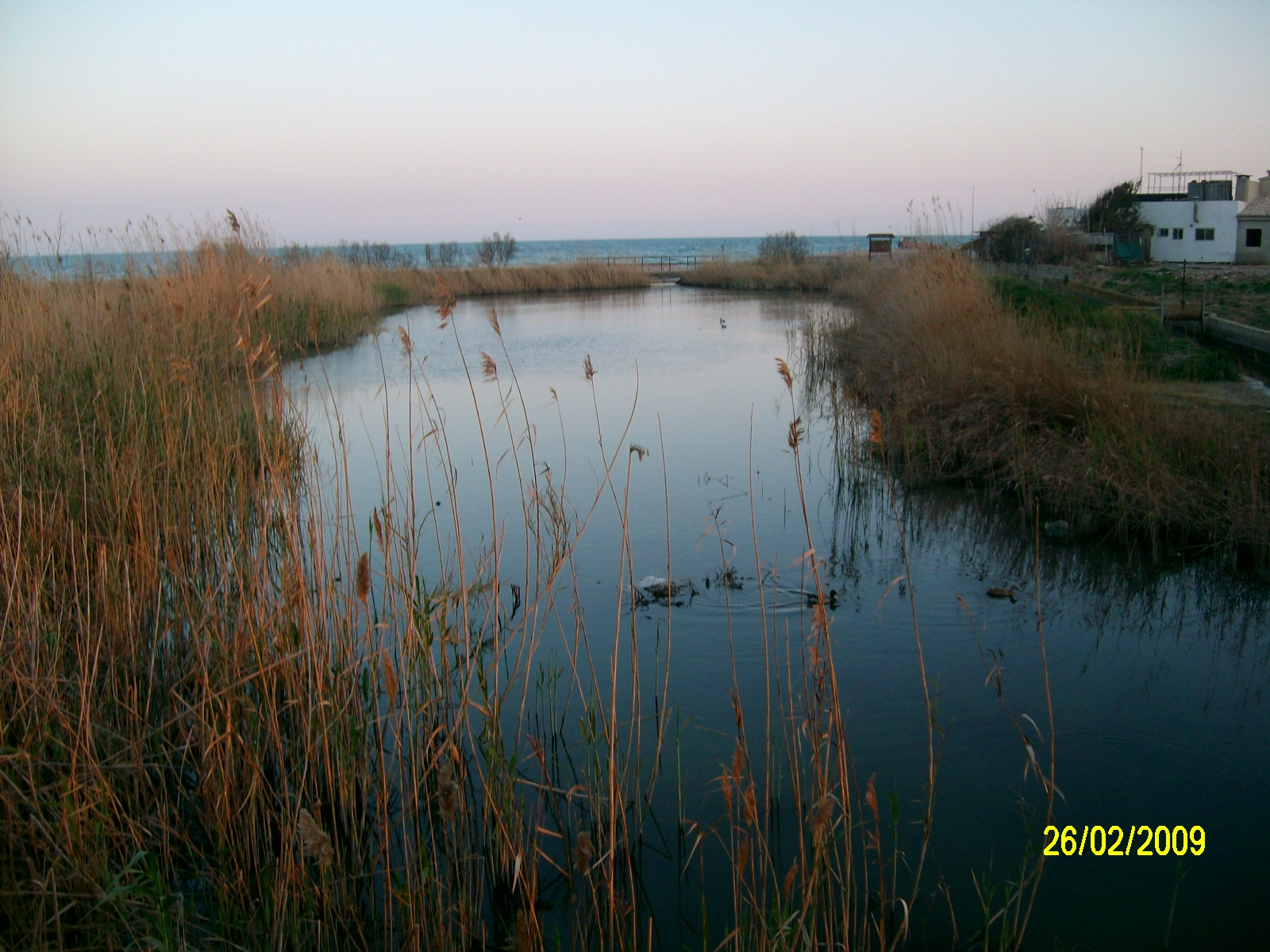 Estany de Puçol a la Marjals dels Moros